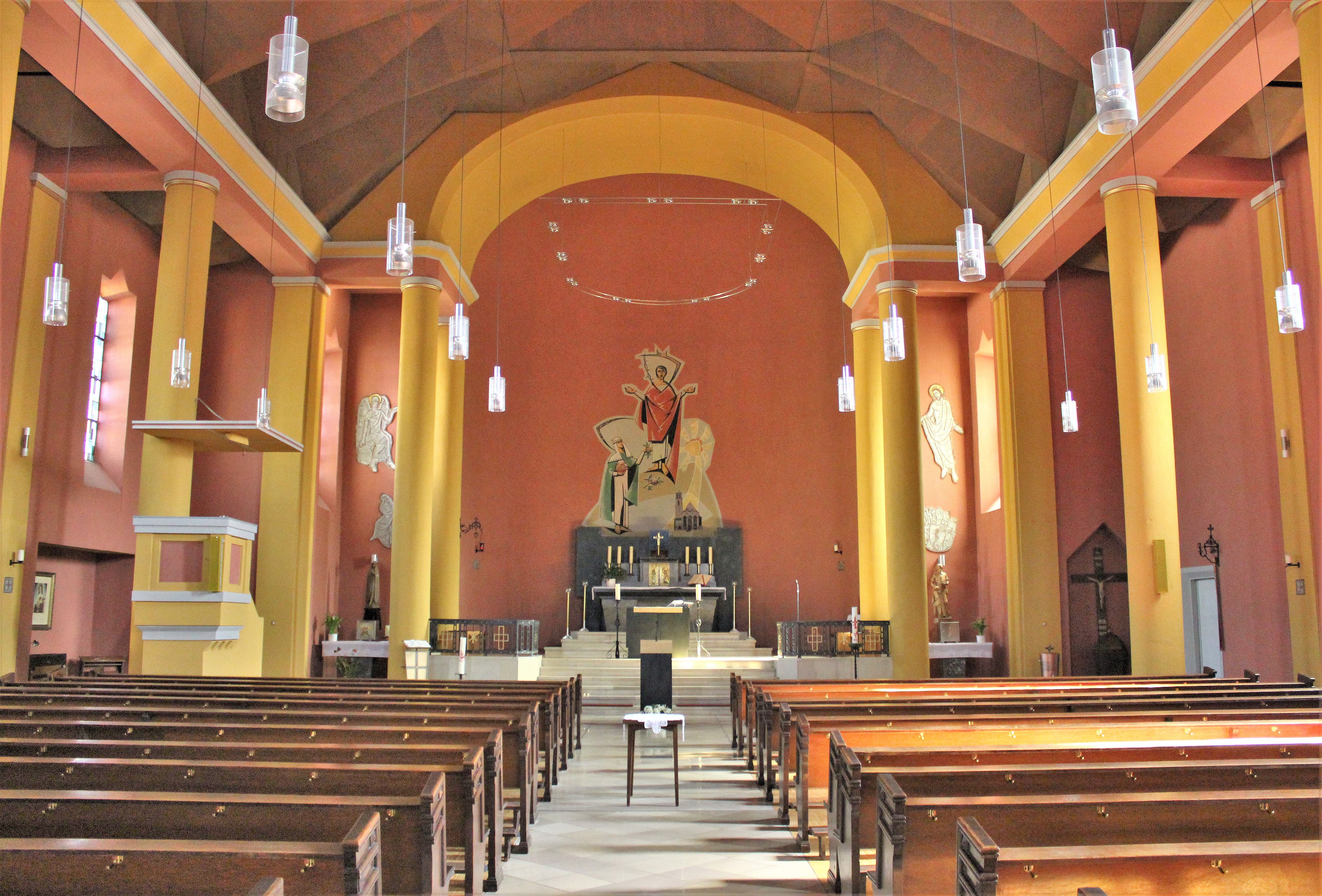 Blick ins Innere der katholischen Pfarrkirche St. Elisabeth in Altenkessel-Rockershausen, einem Stadtteil der saarländischen Landeshauptstadt Saarbrücken